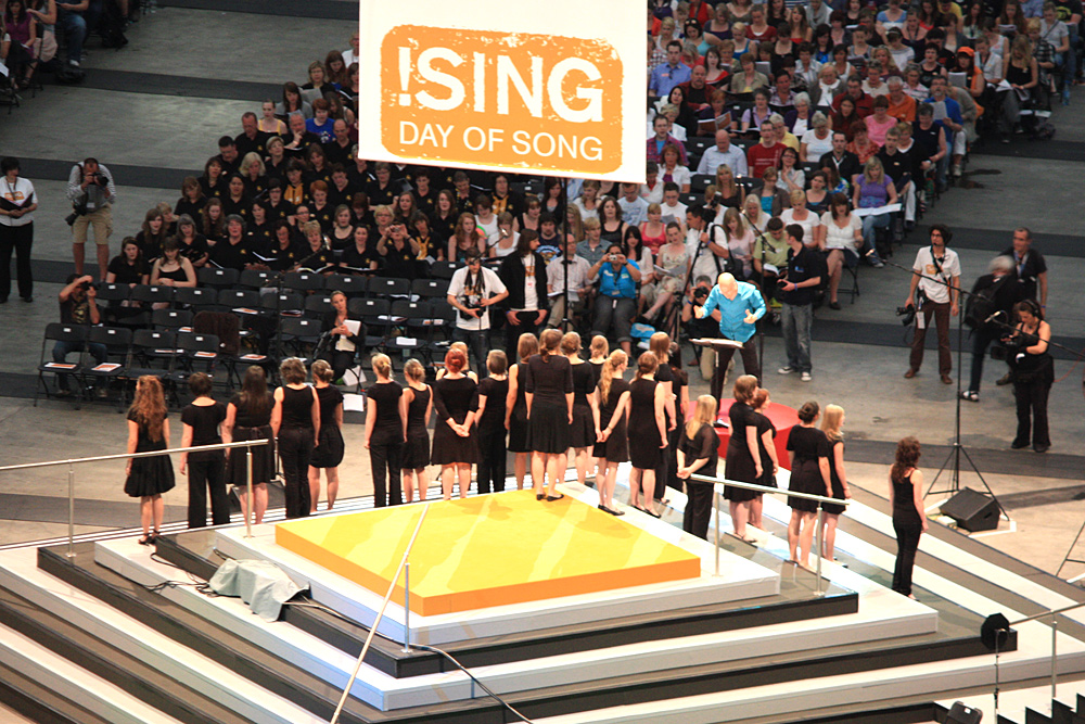 Scala & Kolacny Brothers beim Abschlusskonzert von „!SING - DAY OF SONG“ in der Veltins-Arena in Gelsenkirchen